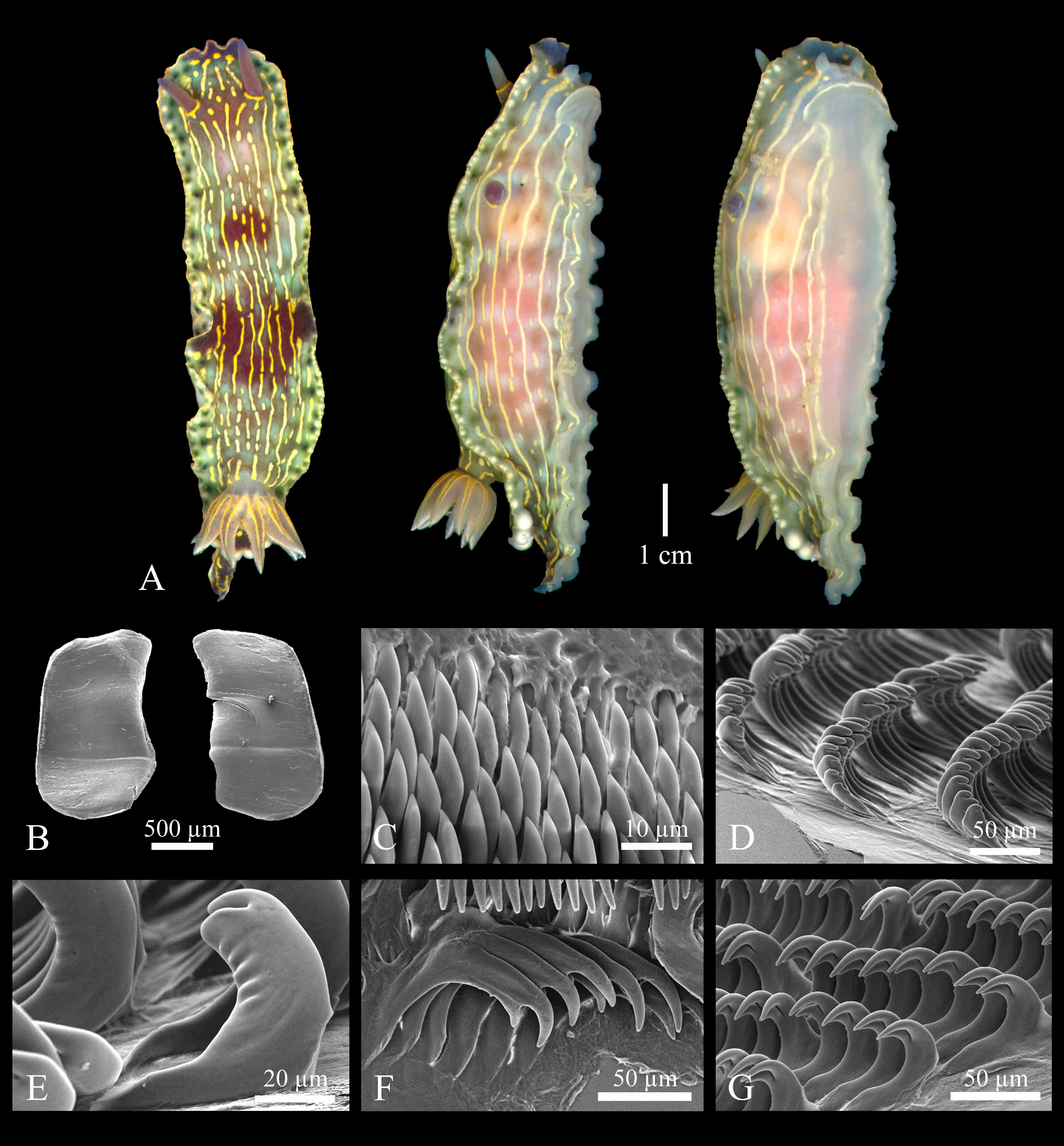 Felimare bayeri. A: Vistas externas del animal. B: placas mandibulares. C: dentículos de mandíbula. D: dientes radulares extremos del lado izquierdo. E: vista externa de diente mediolateral en lado izquierdo. F: dientes radulares cerca del borde exterior, en el lado derecho. G: vista externa de dientes mediolaterales derechos.